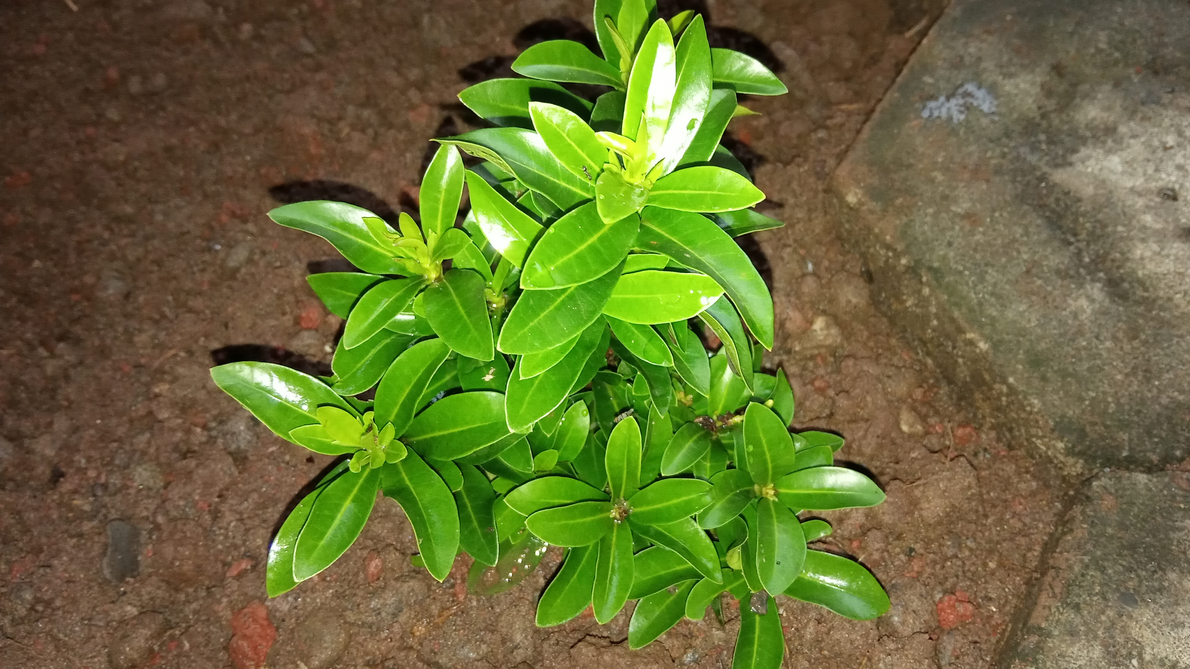 Daun Soka Jawa